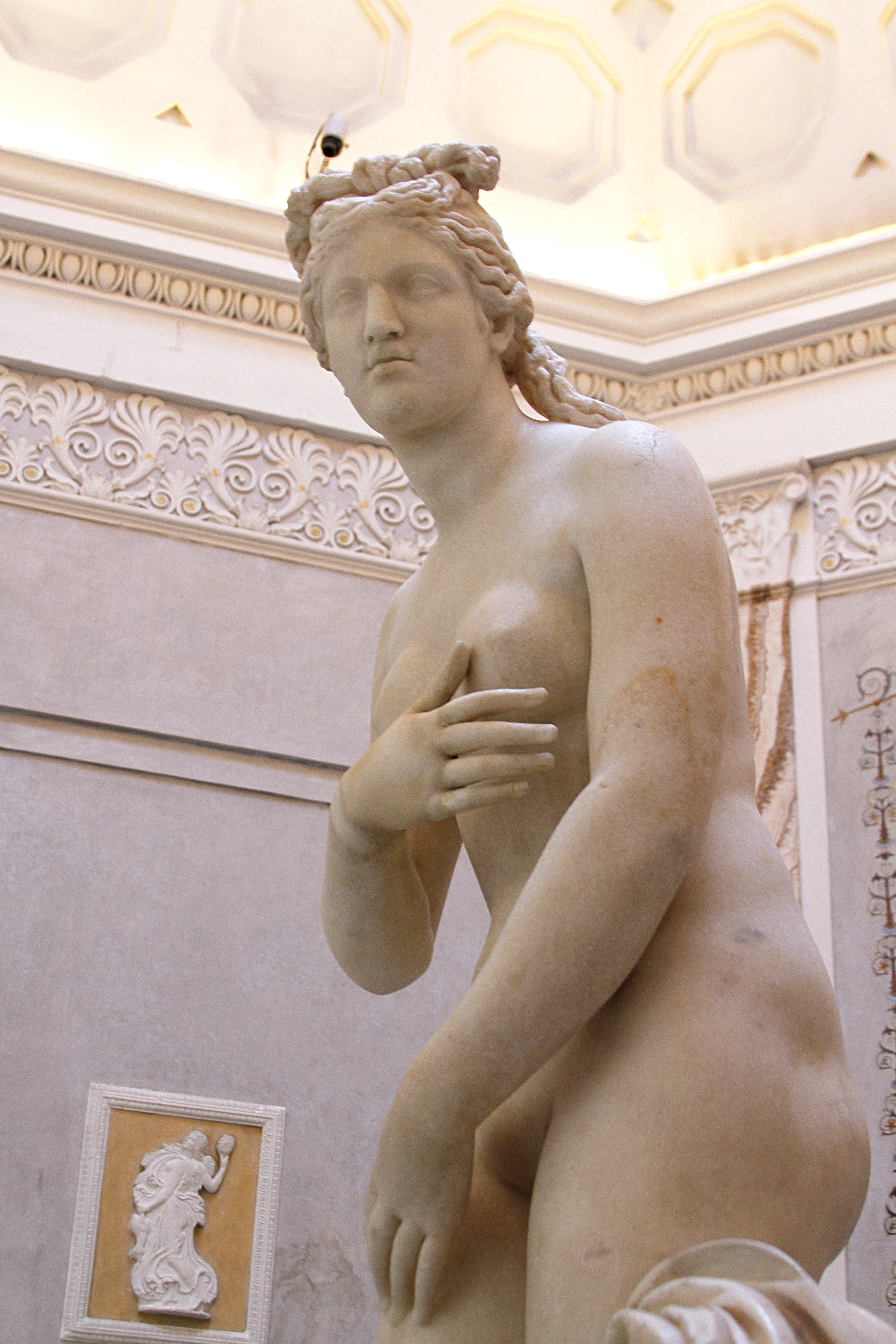 Palazzo Nuovo - Musei Capitolini - Rome